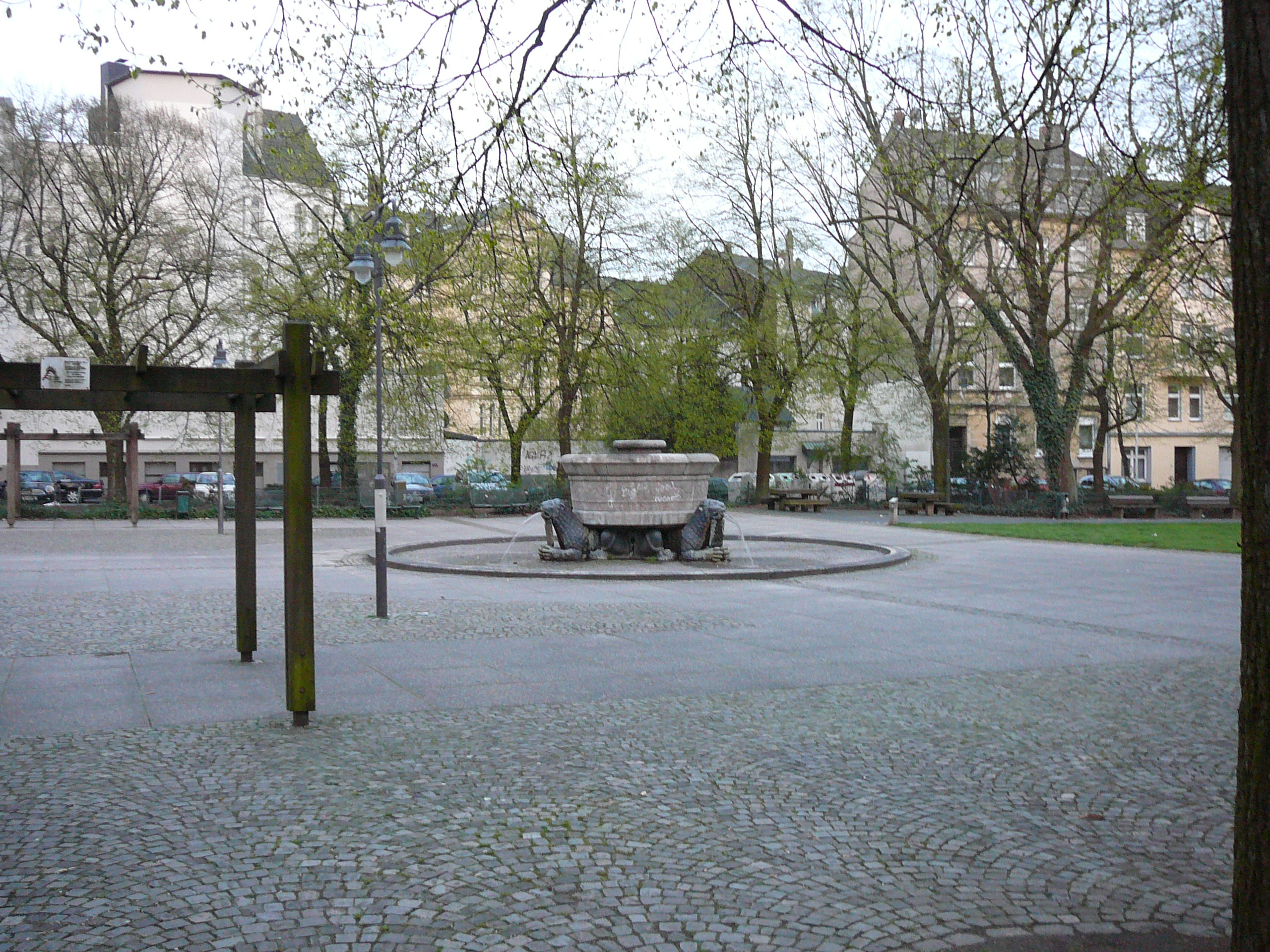 Platz der Republik, Wuppertal